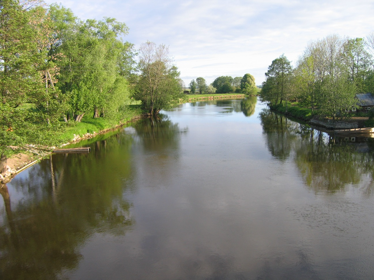 Autoriaus nuotrauka, 2006.05.27. Pakalnės upė (nuo Pakalnės gyvenvietės į Rusnės pusę), Rusnės sala. Nuotrauka gali būti platinama pagal GFDL licenciją.